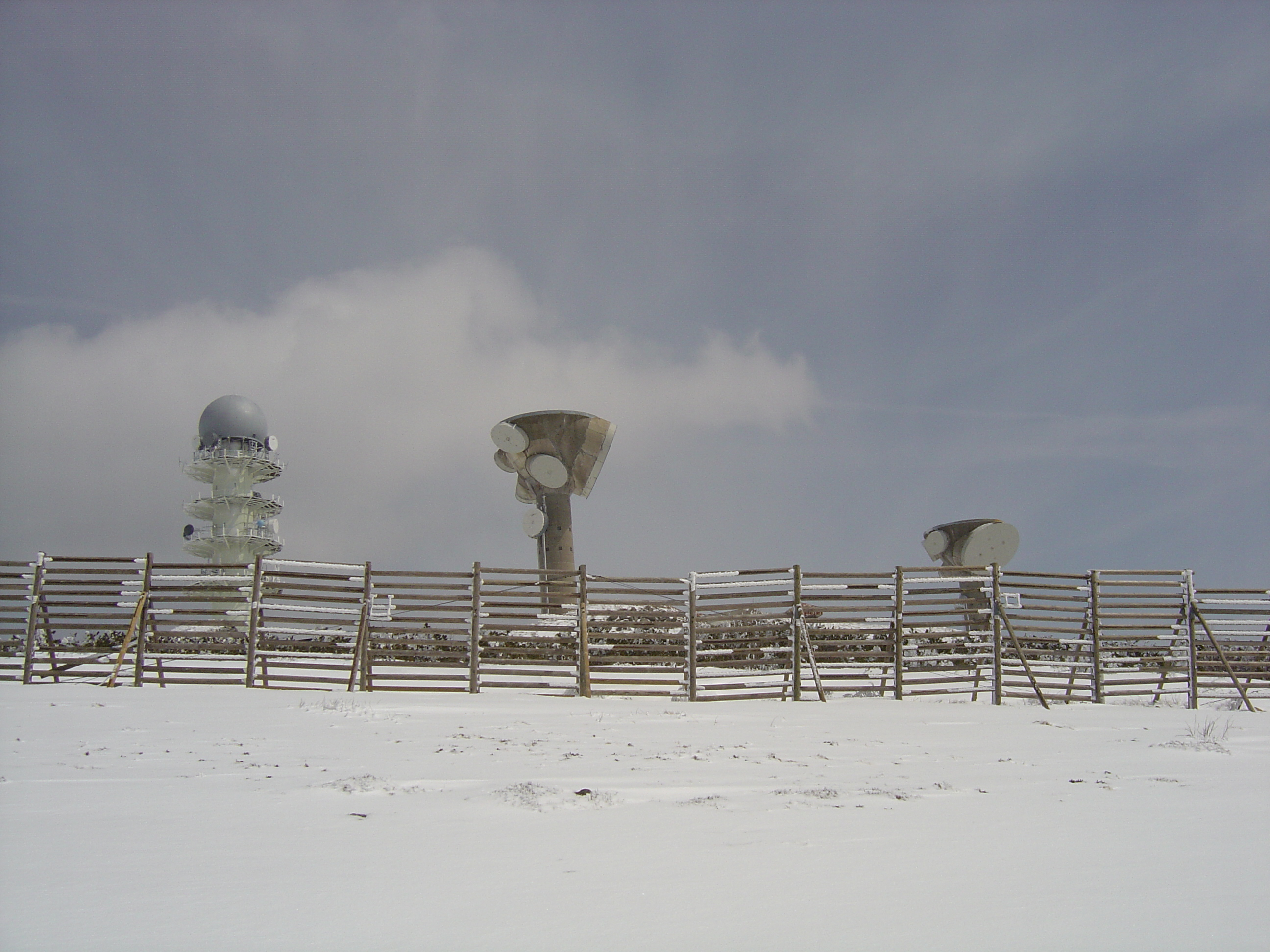 installations militaires de Pierre-sur-Haute